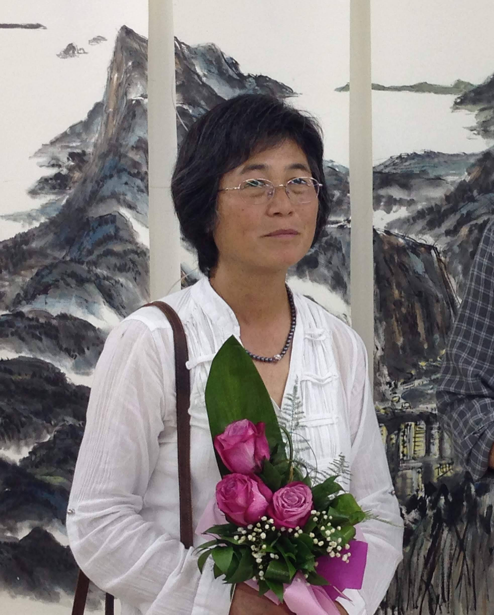 Đo In Fan, slikaica iz Hongkonga, u Galeriji art55, na otvaranju samostalne izložbe u Nišu, 10.jula 2018.